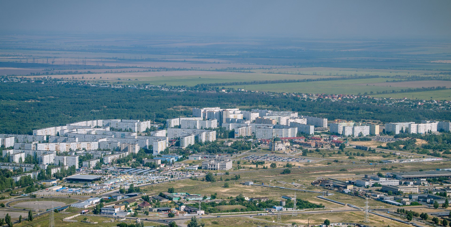 Энергодар. Вид с трубы ТЭС